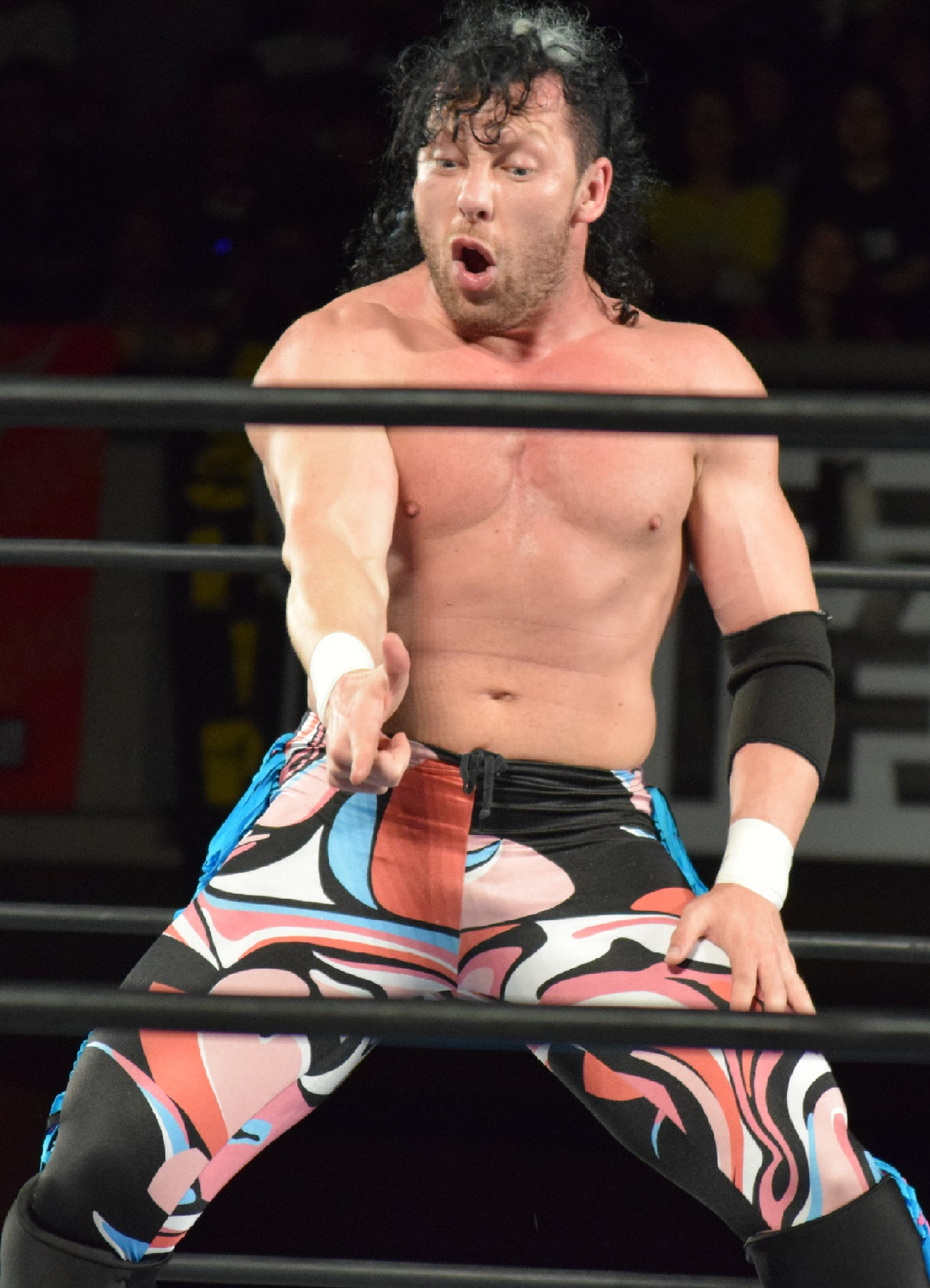 2016年5月29日 大阪市中央体育館・サブアリーナ 「BEST OF THE SUPER Jr.XXIII」 ケニー・オメガ